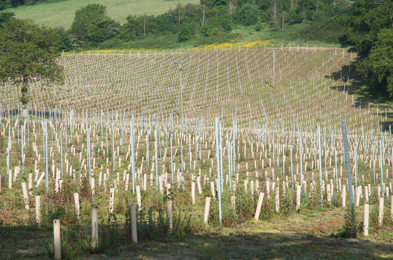 Gwinllan Ystad Llaethliw, dros y ffordd i Gapel Neuaddlwyd, yn Nyffryn Aeron. Dywedir mai yn y cae hwn, o flaen torf o 5,000 o bobl, y cafodd y cenhadon cyntaf a aeth i Fadagasgar eu hordeinio.